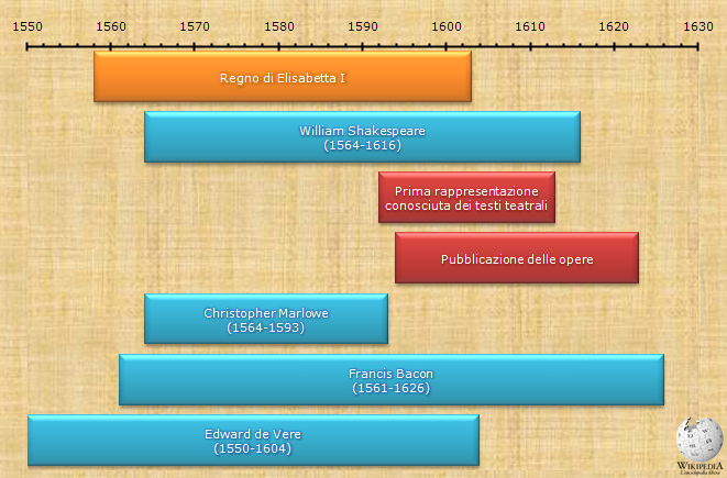 I principali candidati all'attribuzione delle opere di Shakespeare